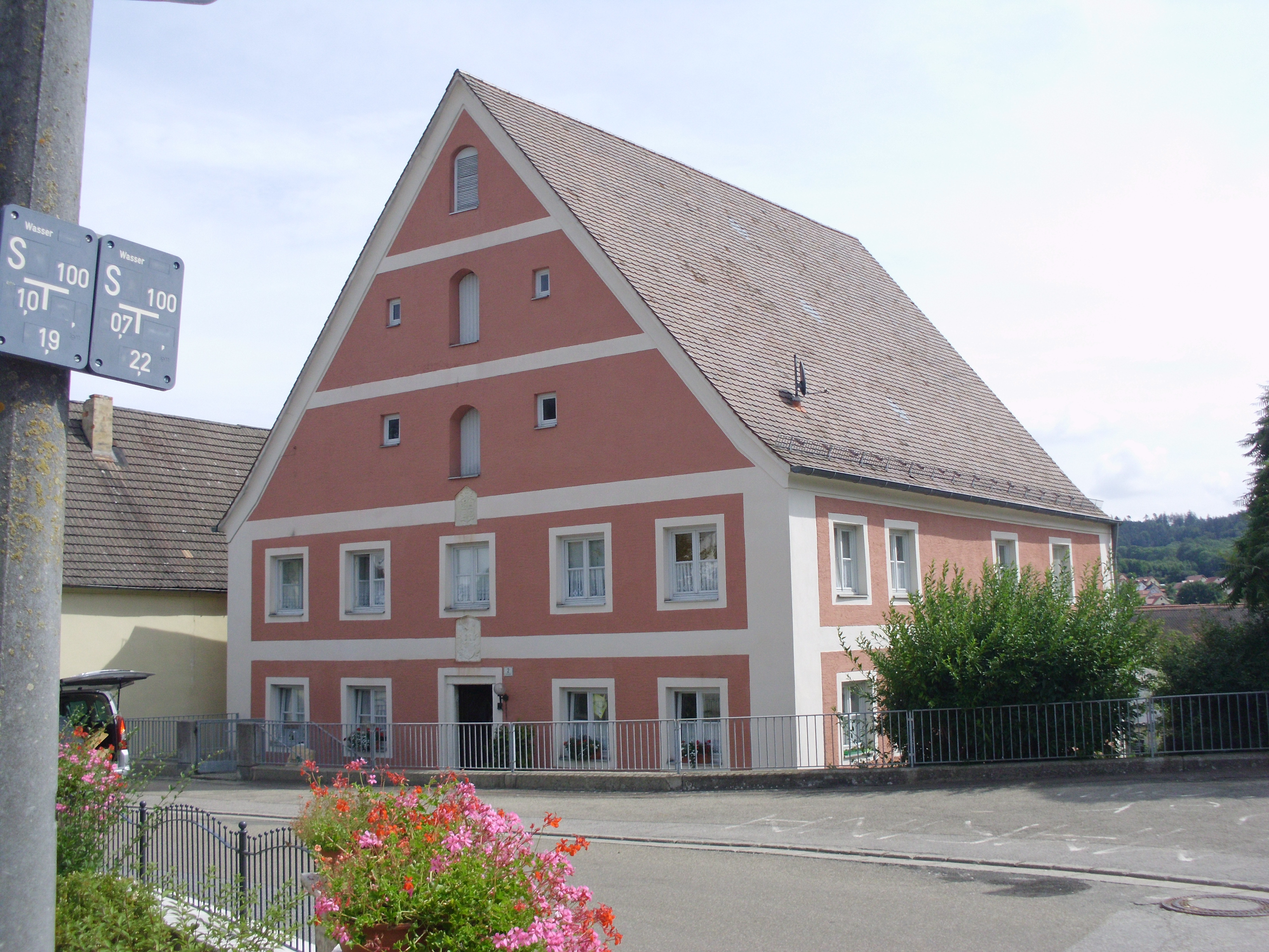 Obermässing, Gemeindeteil von Greding im mittelfränkischen Landkreis Roth, Am Kirchplatz 2 (Baudenkmal Pfarrhof)